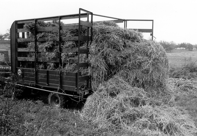 Test (Entladen) des Prototyps des Futter-Lade- und Transportgerätes (Ladewagen) von Ernst Weichel